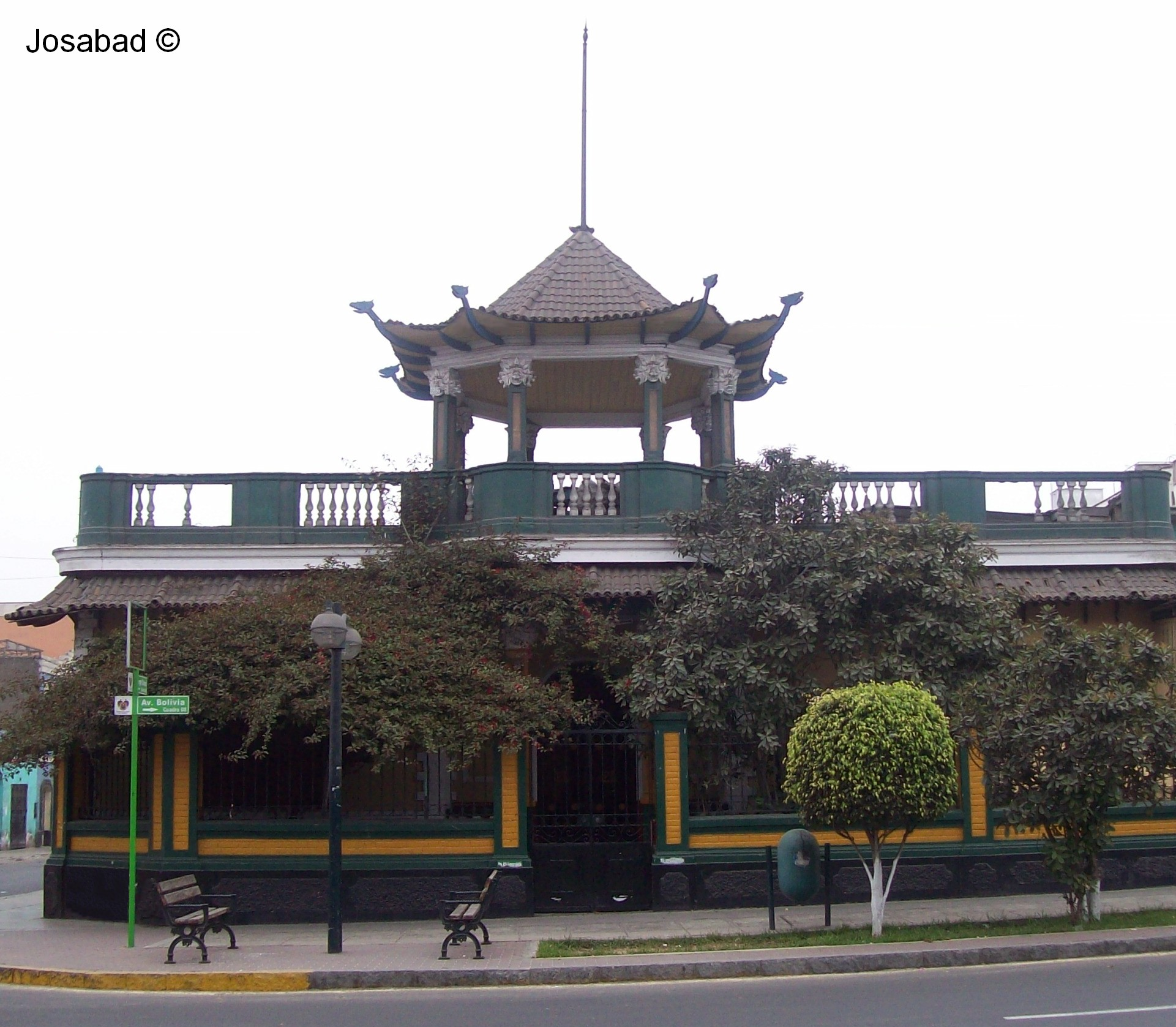 Esquina del Jirón Jorge Chávez y la Avenida Bolivia, en el distrito de Breña. El local perteneció por años al Club Departamental San Martín.